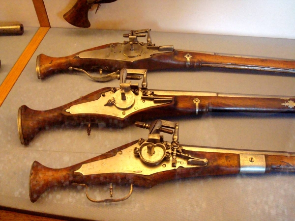 Série de pistolets à rouet du musée des Doges à Venise. (photo personnelle)